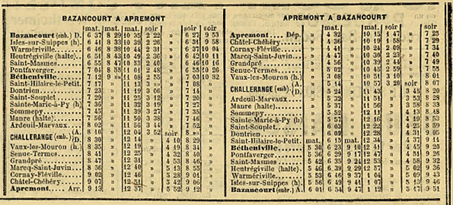 Fahrplanauszug 1909 der Bahnstrecke Challerange–Apremont-sur-Aire